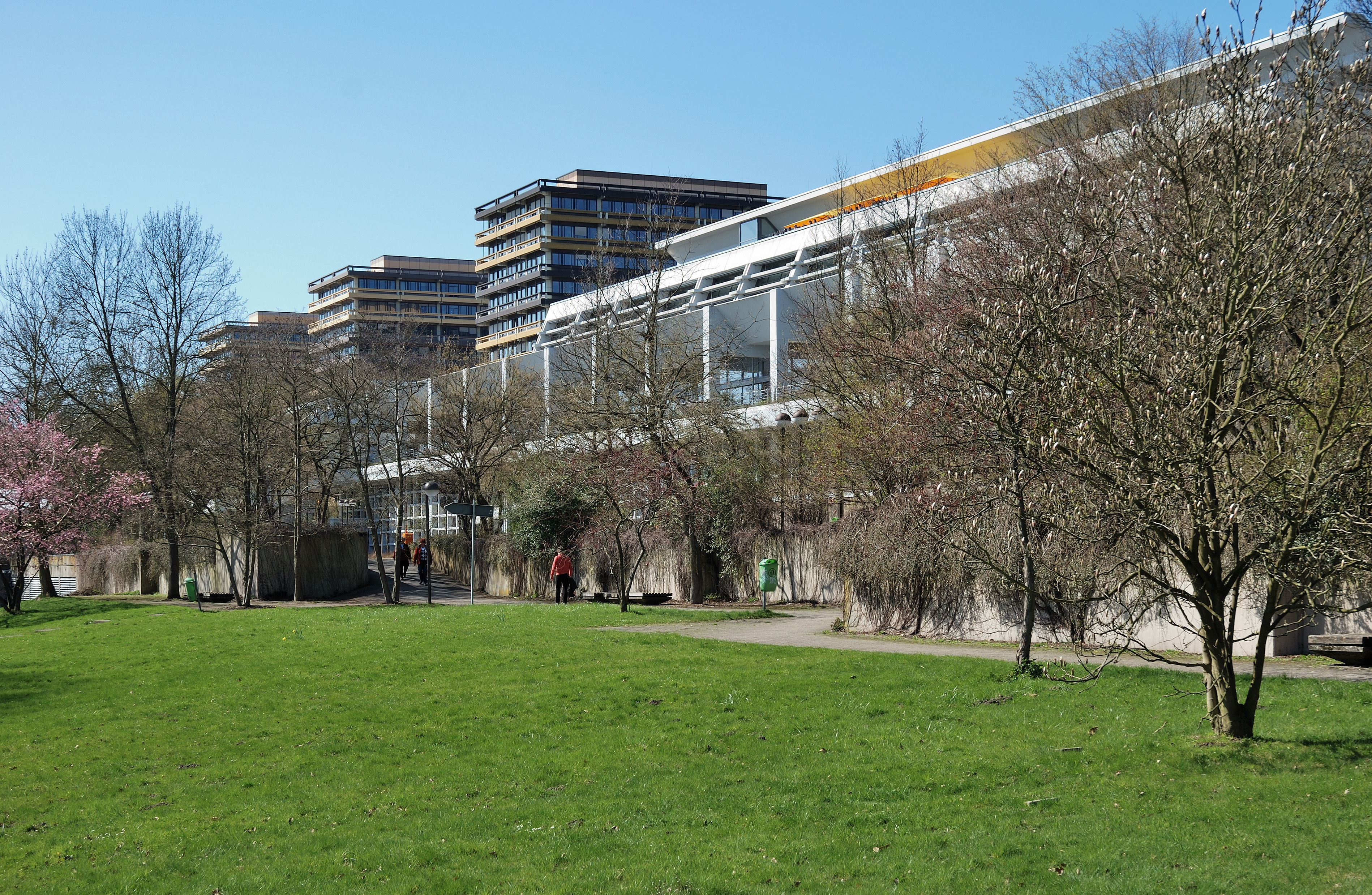 RUB, G-Gebäude